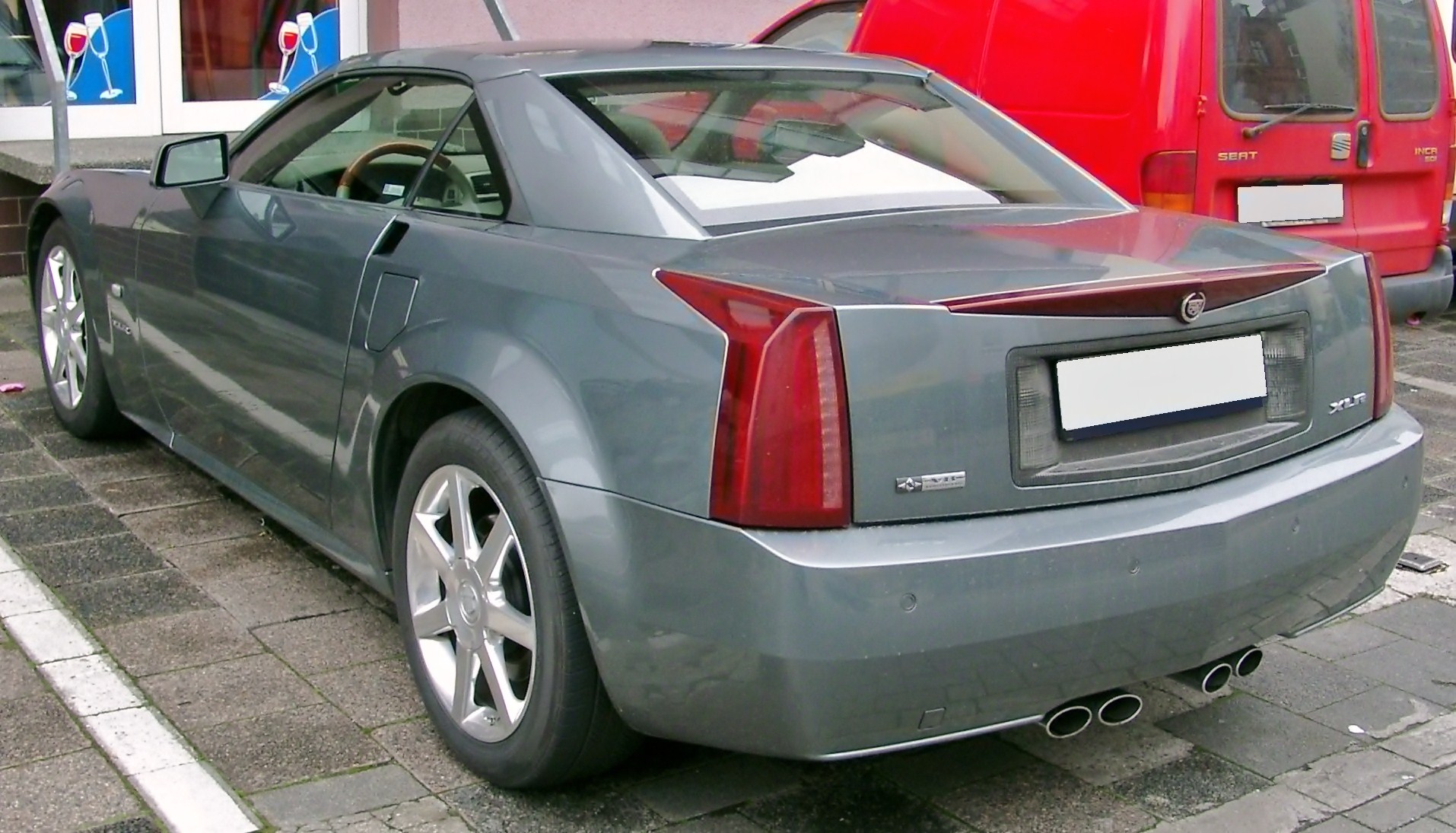 Cadillac XLR